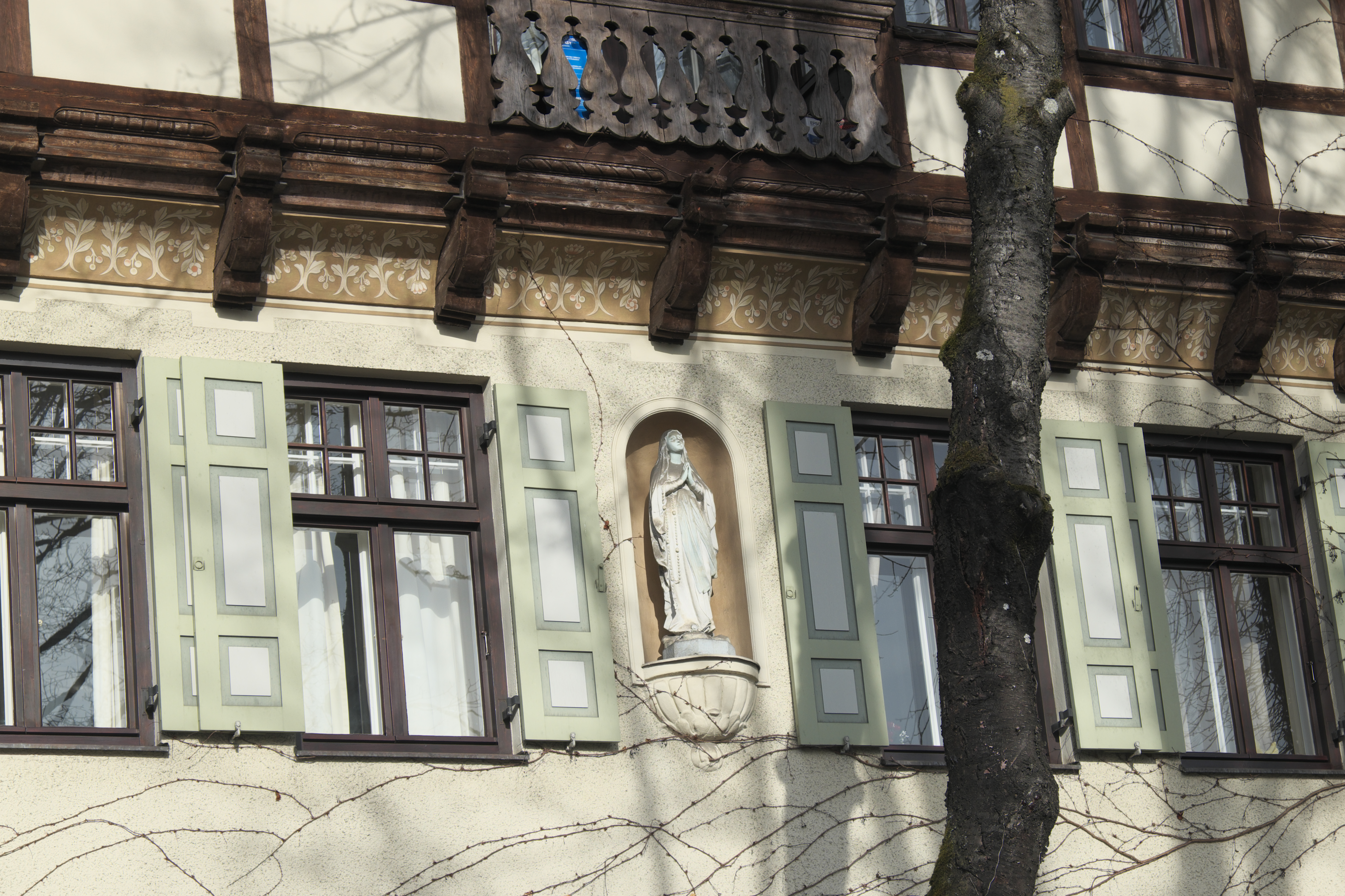 Vorstadthaus Alte Allee 4 in Pasing im Stadtbezirk Pasing-Obermenzing in München (Bayern/Deutschland), 1898 von Gustav Rühl erbaut